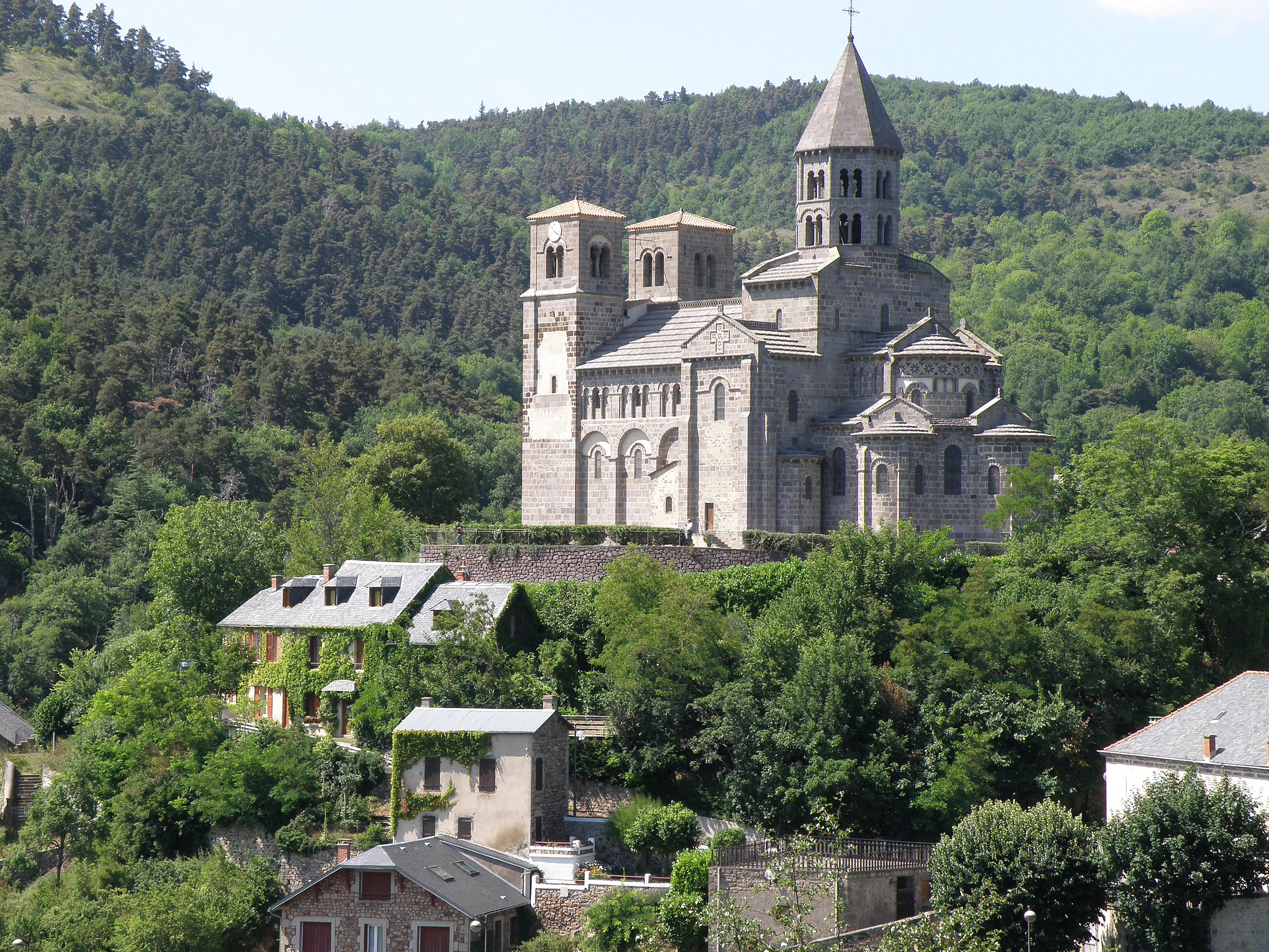 Saint-Nectaire, commune du Puy-de-Dôme (France, région Auvergne). Église Saint-Nectaire (XIIe siècle), sur le Mont Cornadore.